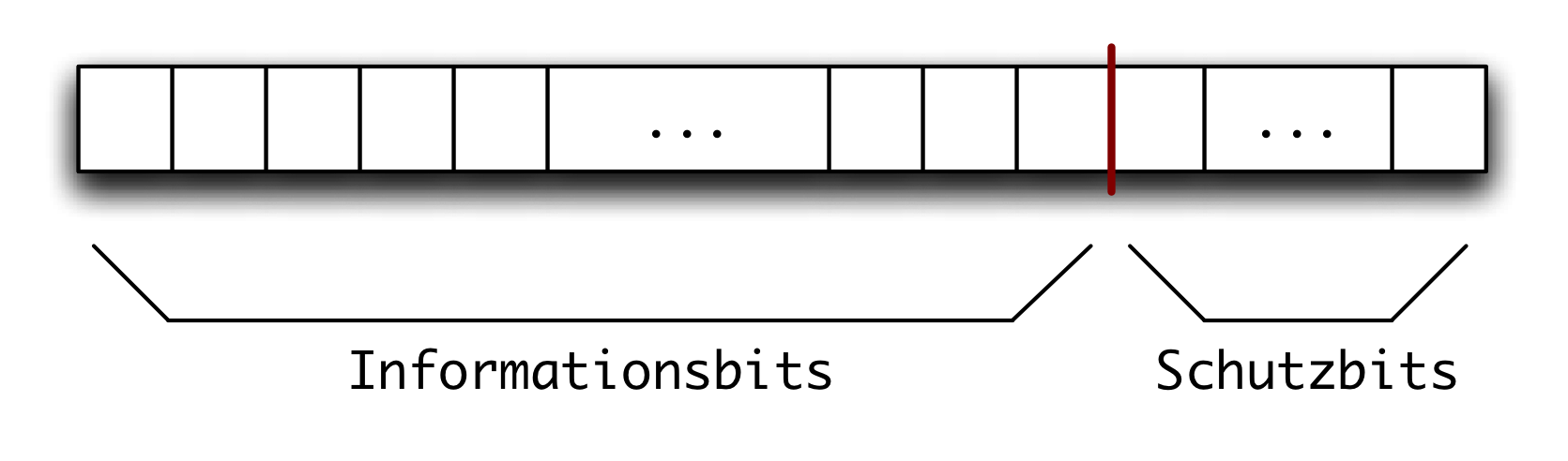 Schematische Zeichnung zur Verdeutlichung von Block-Codes